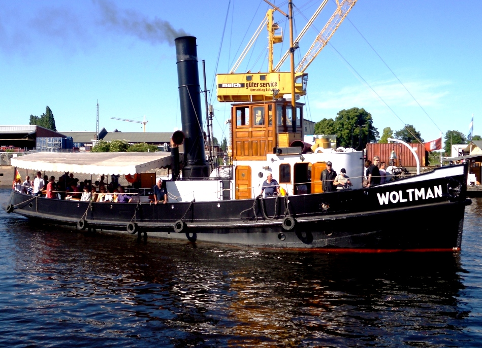 Dampfschlepper Woltmnan auf dem Harburger Hafenfest 2011